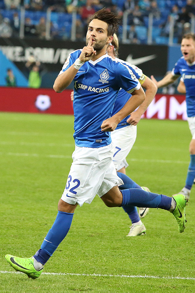 «Динамо» СПб - «Зенит»